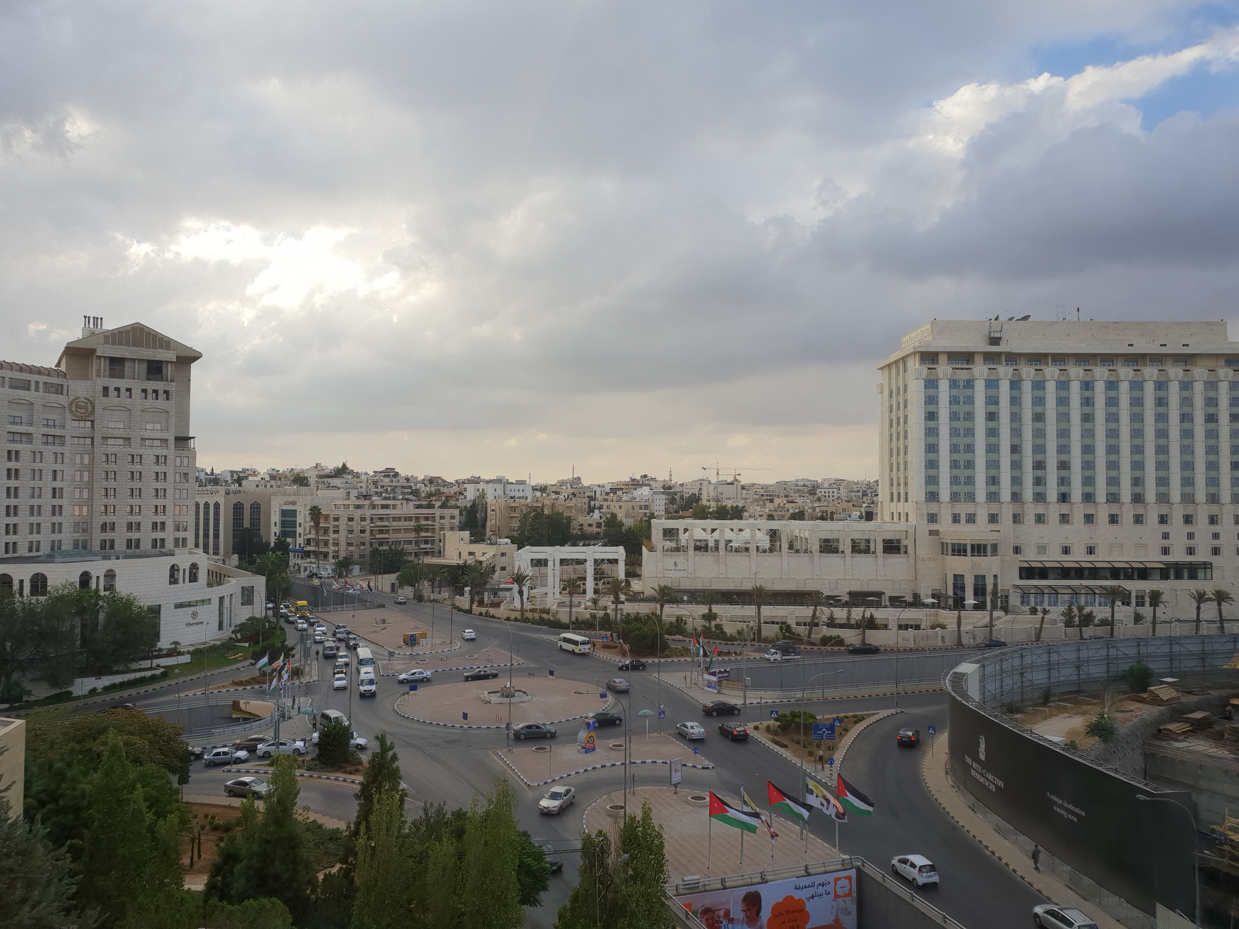 صورة علوية لمنظر الغيوم في يوم صيفي بمنطقة الدوار الخامس و يظهر فندق الفورسيزون و شيراتون